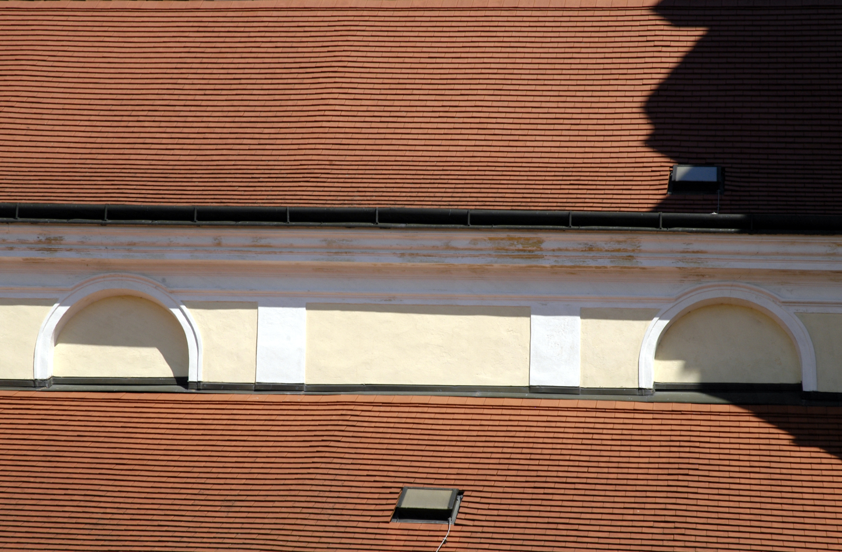 katholische Pfarrkirche heiliger Martin, vermauerte Lünettenfenster an der Südfassade